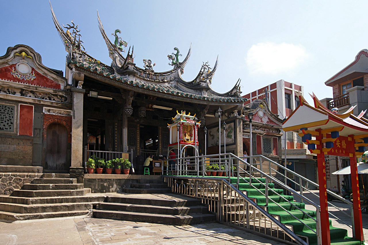 澎湖天后宮